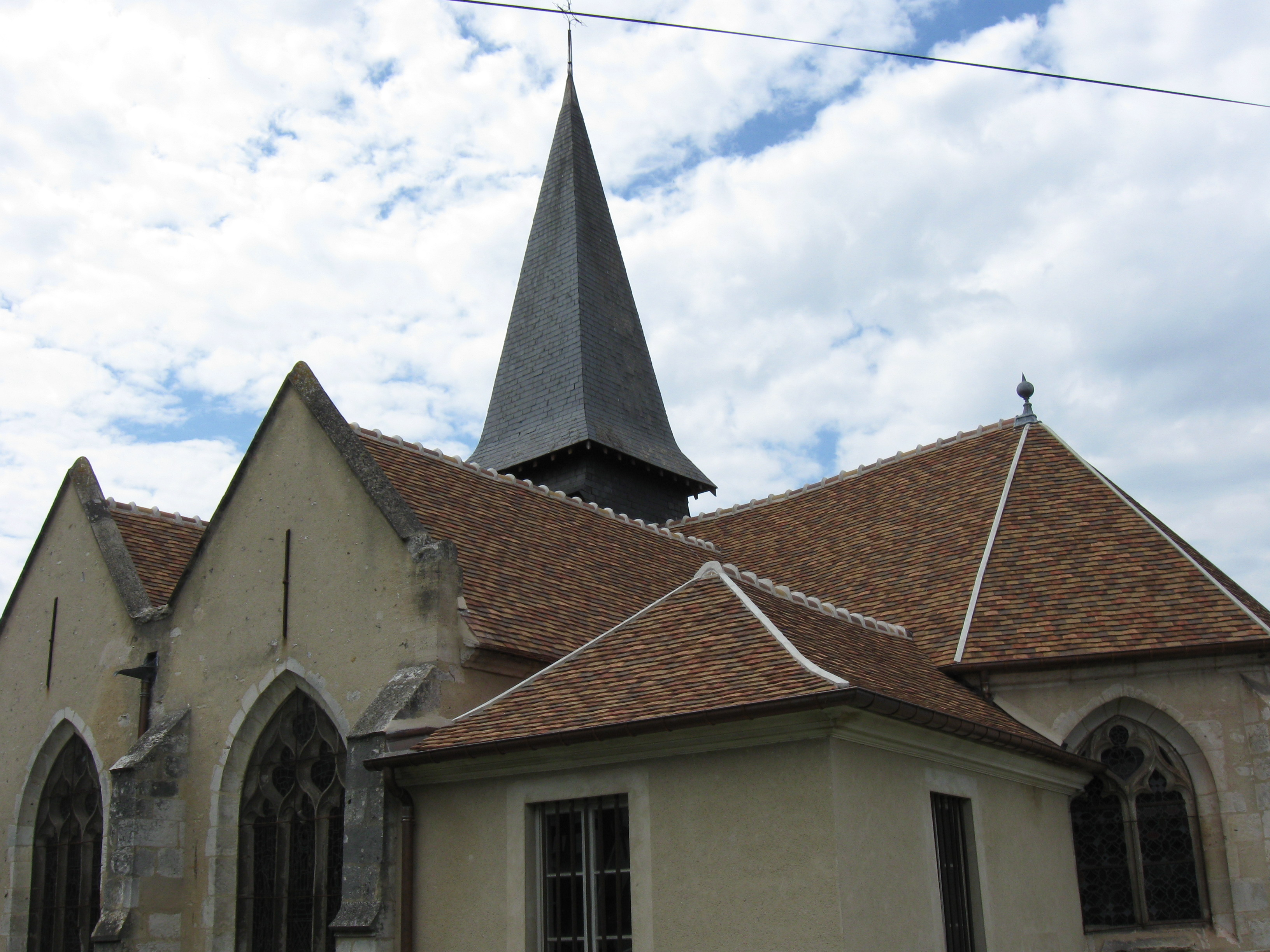 Église Saint-Crépin-et-Saint-Crépinien de Gommecourt. (département des Yvelines, région Île-de-France).